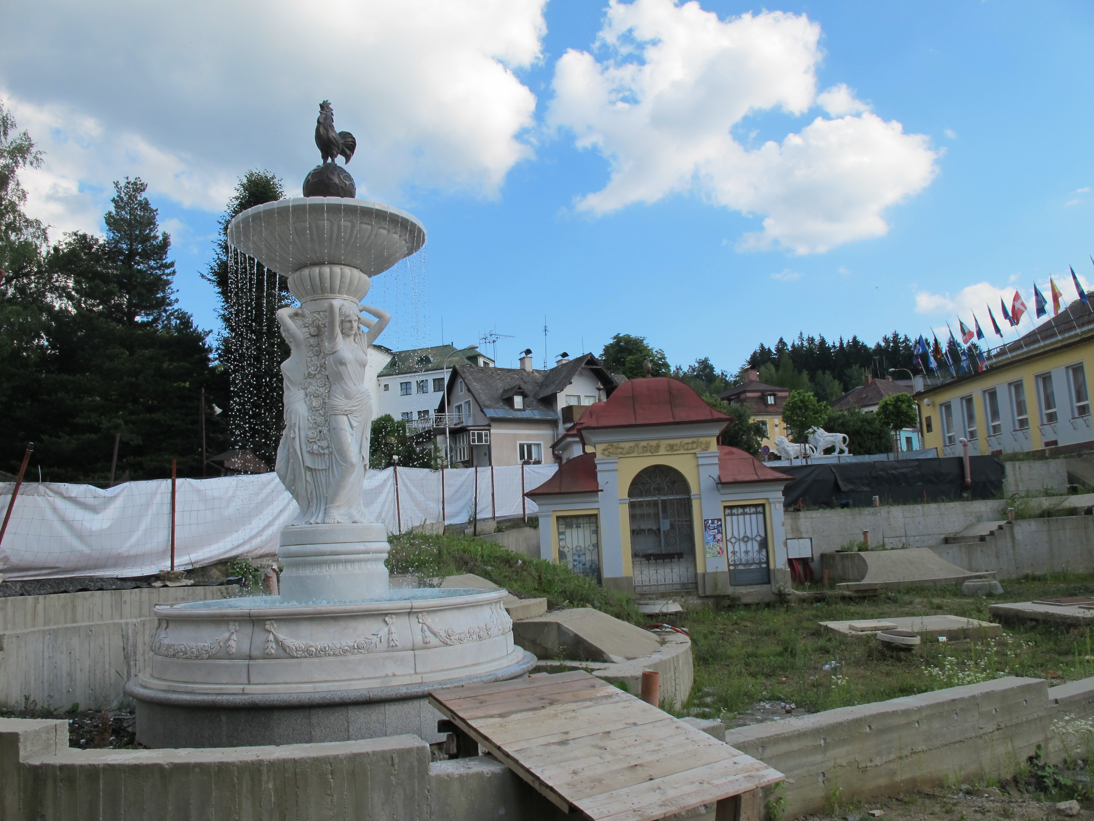 Fontäne - noch im Bau in Bad Liebwerda